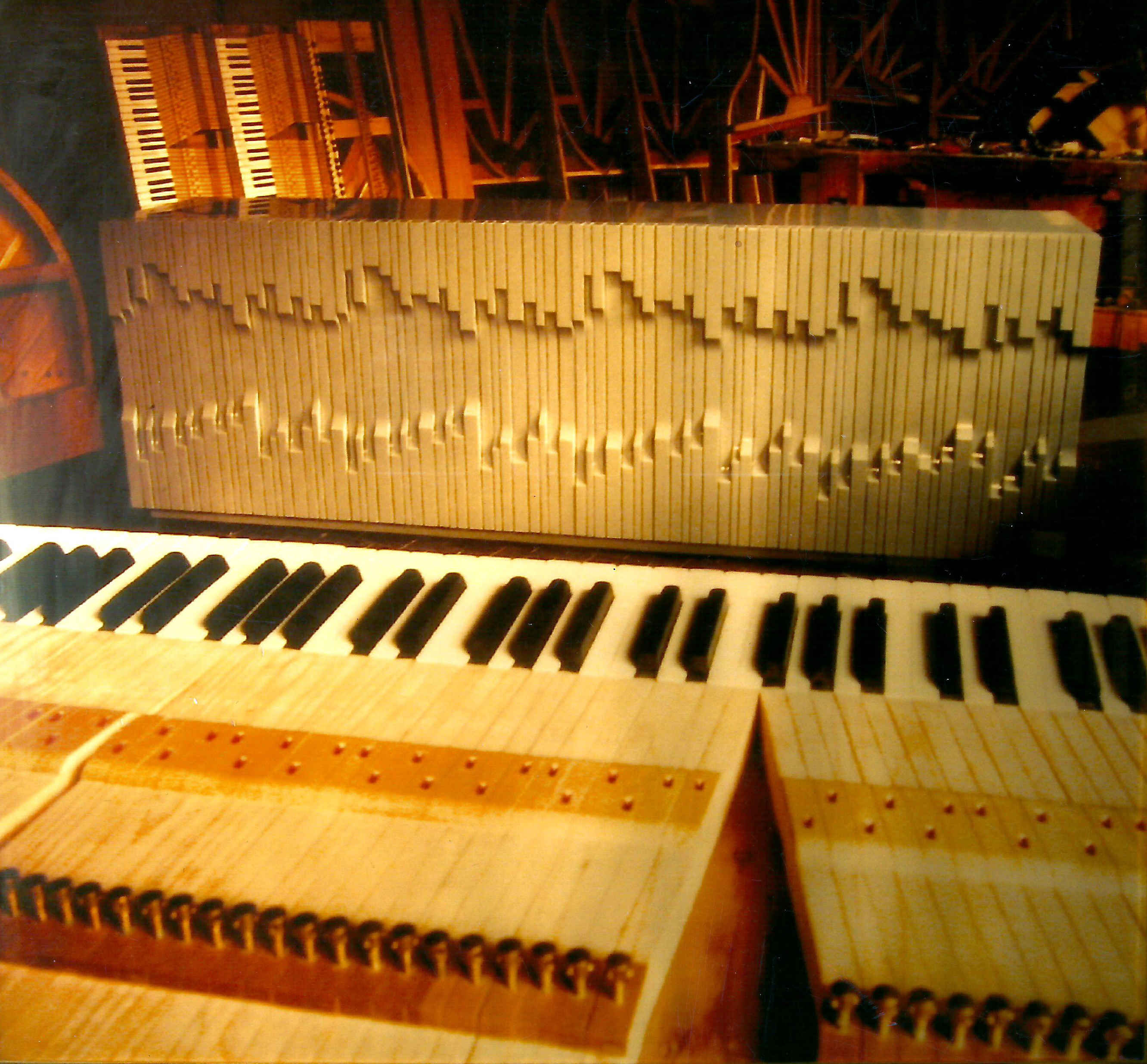 Uno dei mobili più significativi dell'opera di Luciano Frigerio.